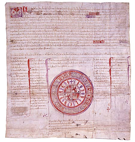 Privilegio rodado de Sancho IV concediendo el Señorío de Ceutí a la Orden de Santiago.